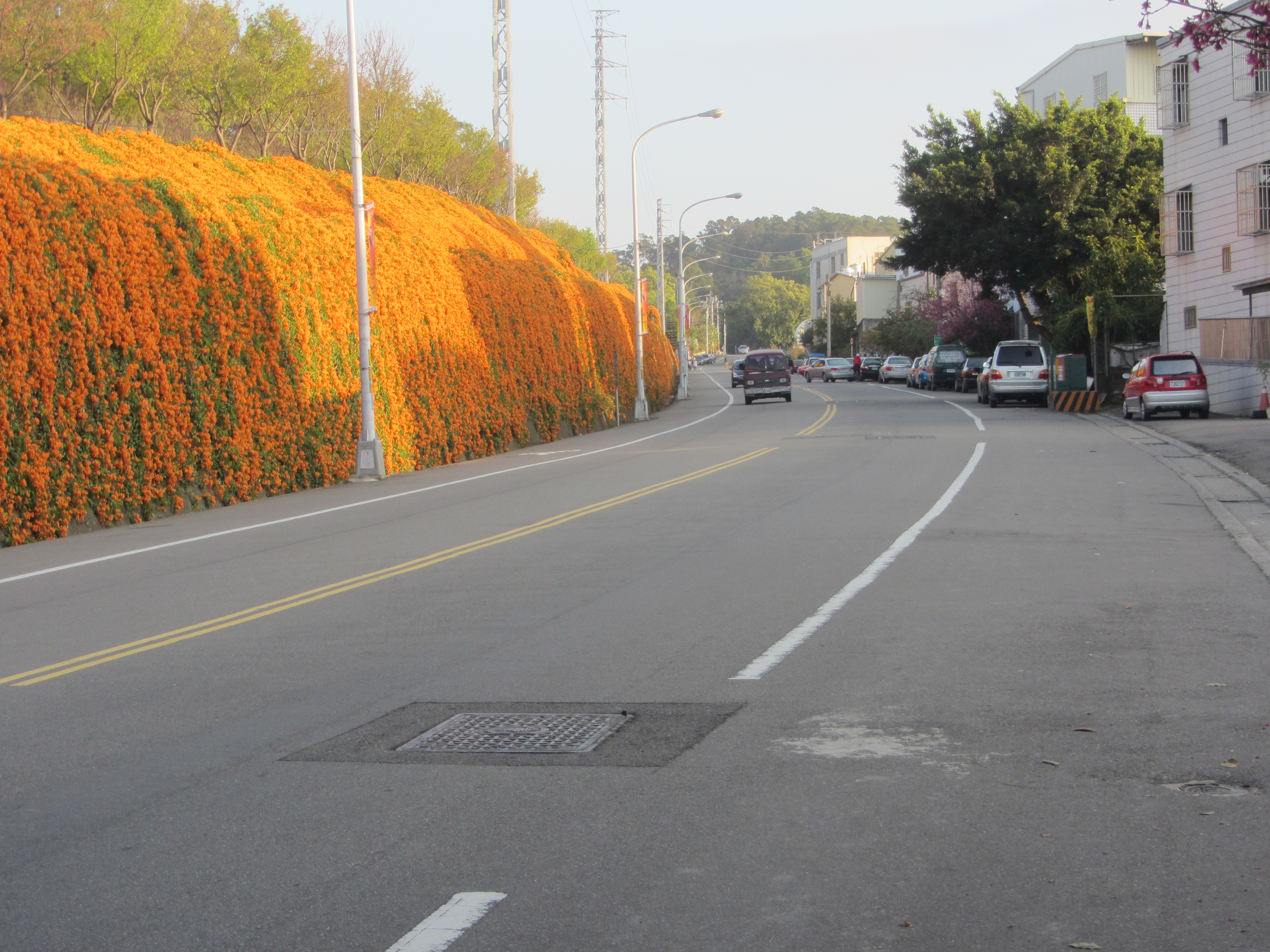 位於苗栗縣銅鑼鄉的一段縣道119號